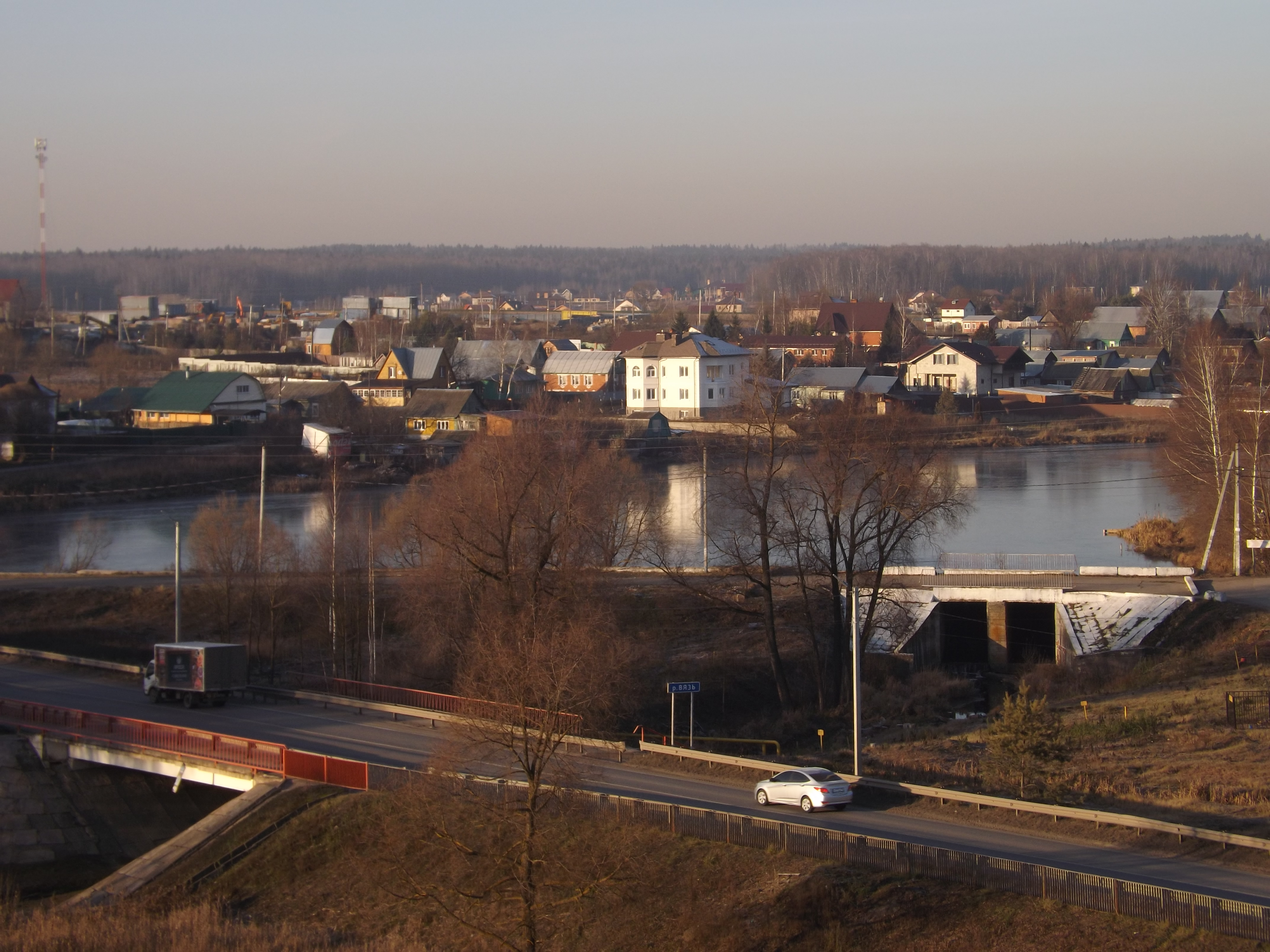 Вид на село Ельдигино c колокольни Церкви Троицы Живоначальной. (Пушкинский район Московской области России.)